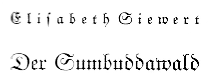 Inner cover of: Elisabeth Siewert (1867–1930), Der Sumbuddawald, Ring-Verlag, Berlin 1928.